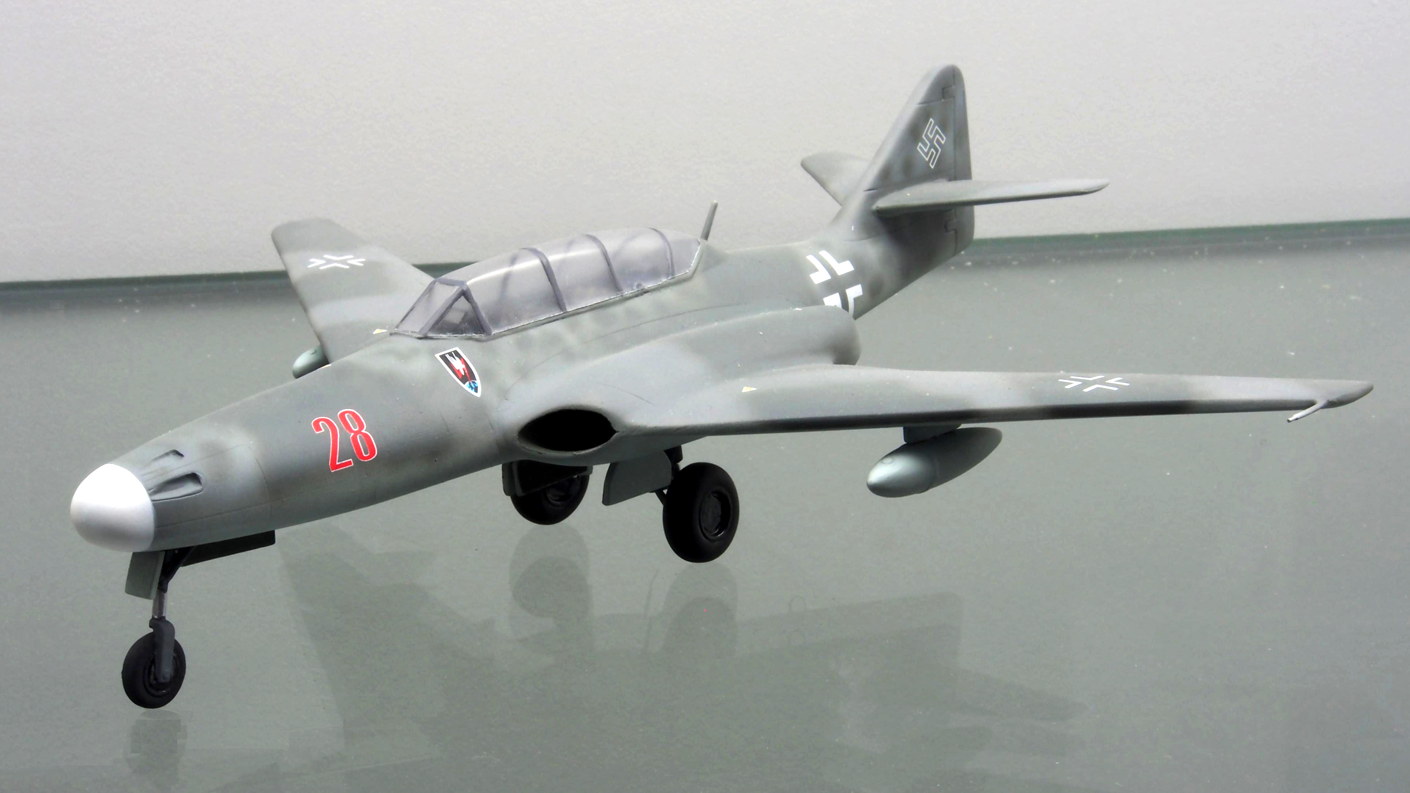 Messerschmitt Me 262 HG III